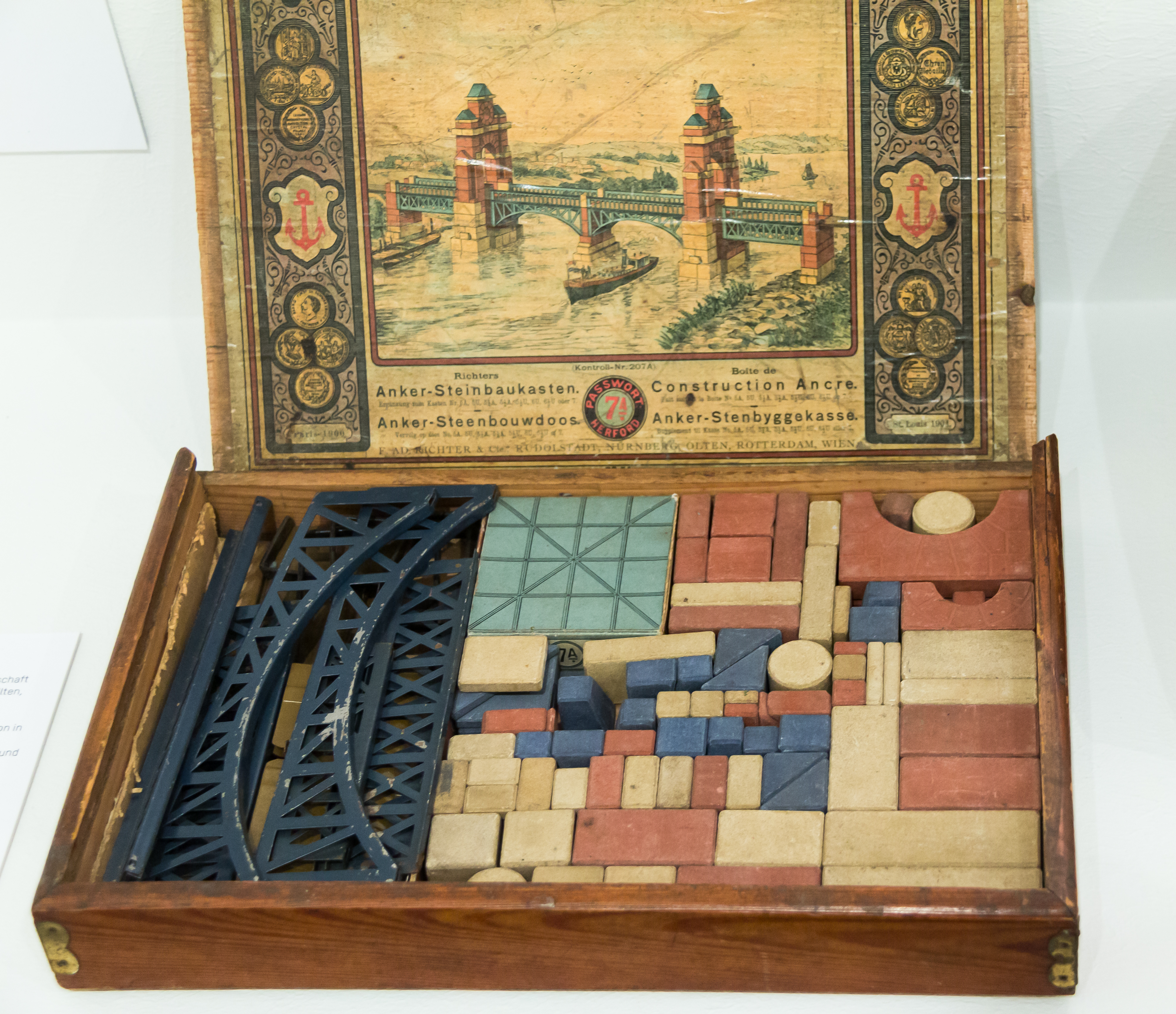 Ausstellung im Kölnischen Stadtmuseum: „Köln 1914 – Metropole im Westen“. Objekt: Steinbaukasten. Hersteller: Ankerwerk